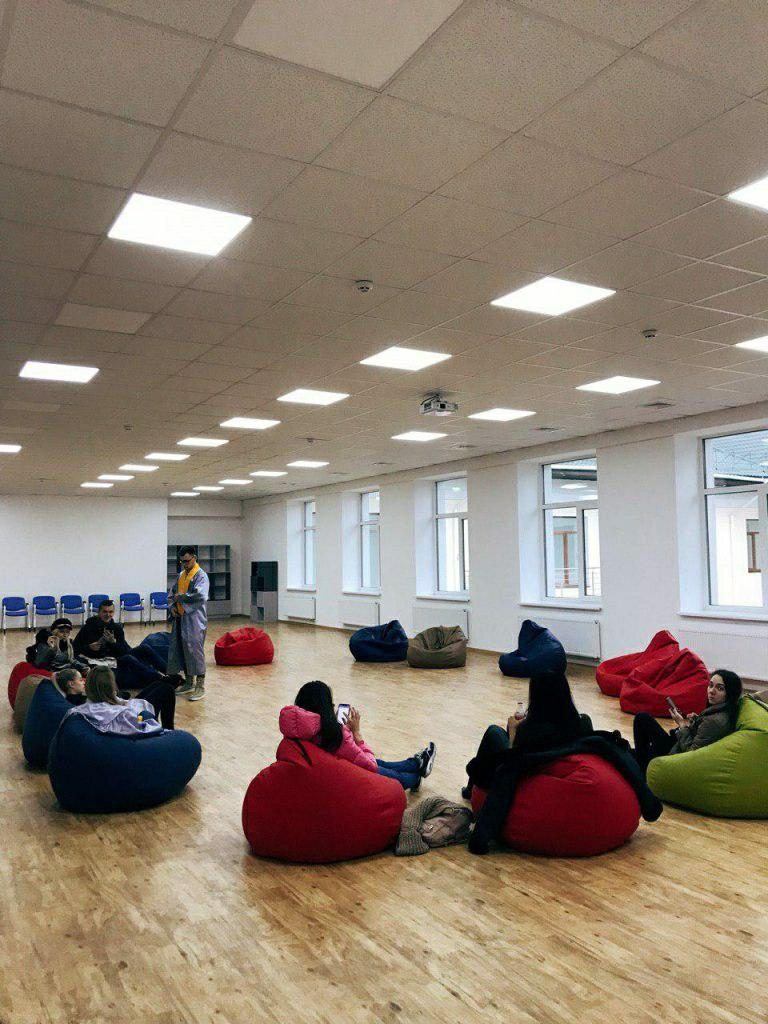 Навчальна авдиторія в новому корпусі Острозької академії